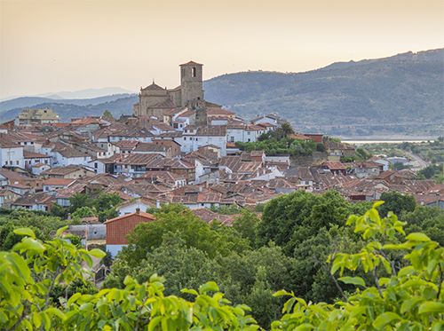 Vista general de Hervás desde el puente del ferrocarril, en la provincia de Cáceres, Extremadura, España.